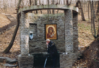 Киселева балка.